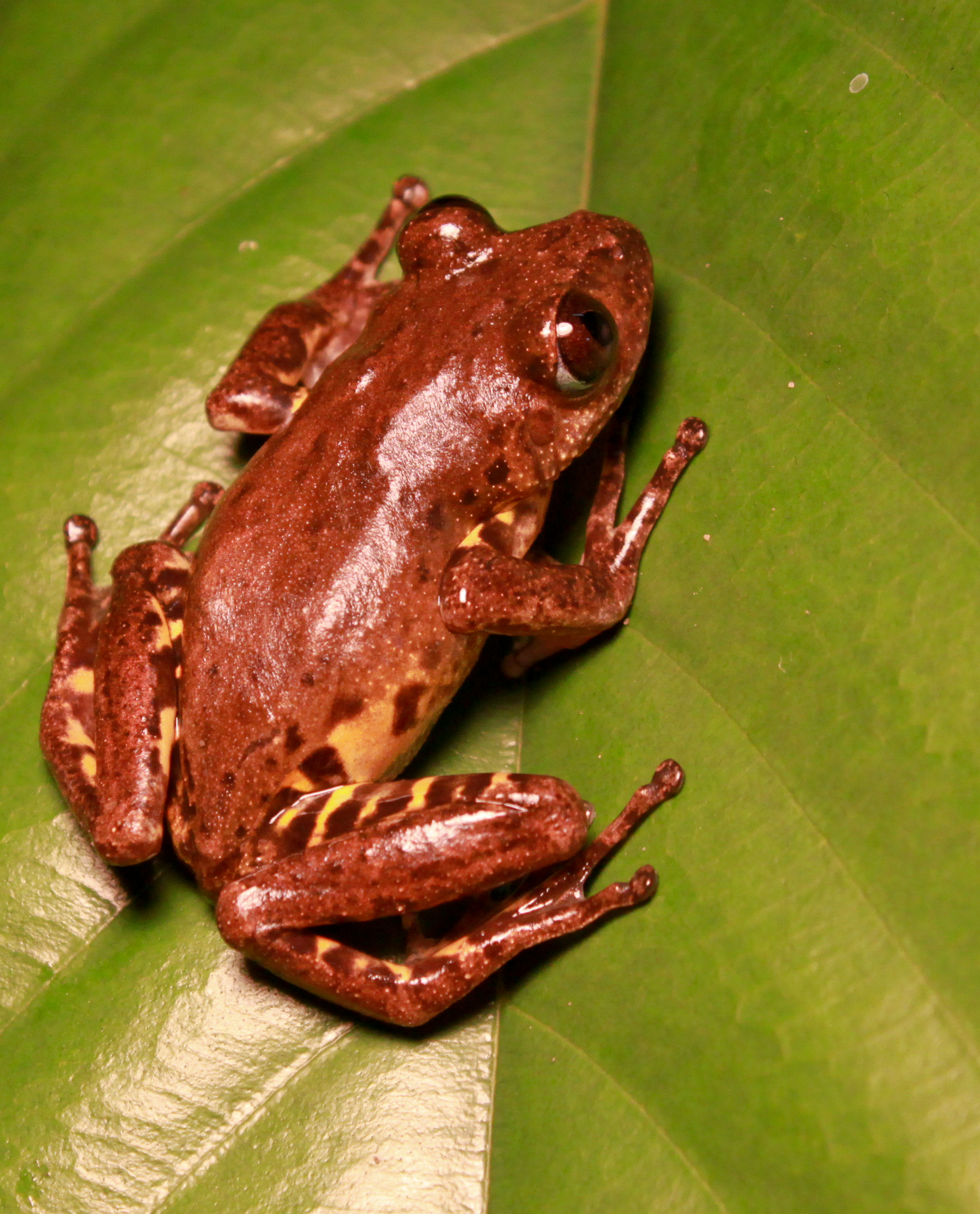 Phlyctimantis leonardi. Libreville, Gabon.